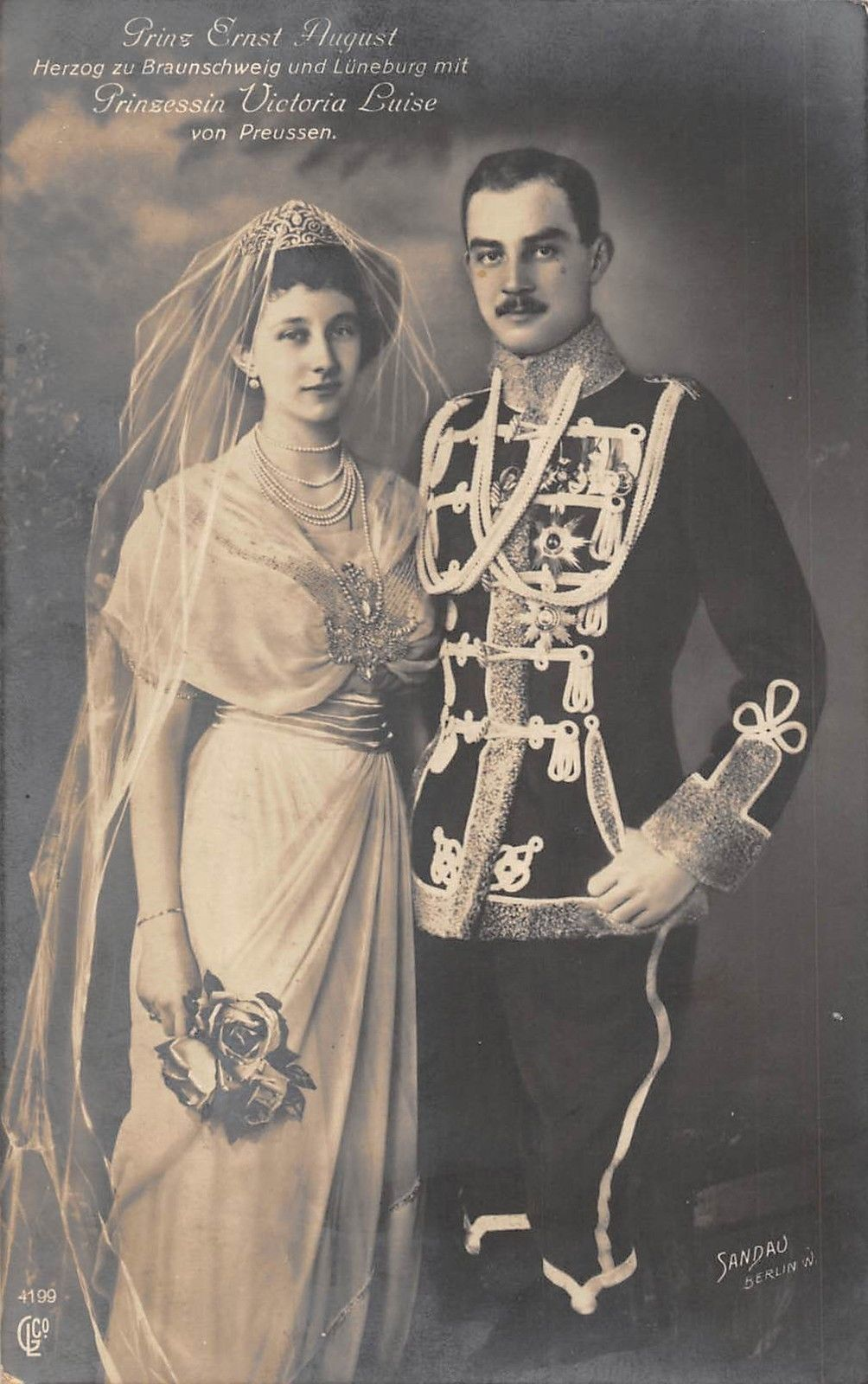 Prinzessin Victoria Luise und Prinz Ernst August, 1913